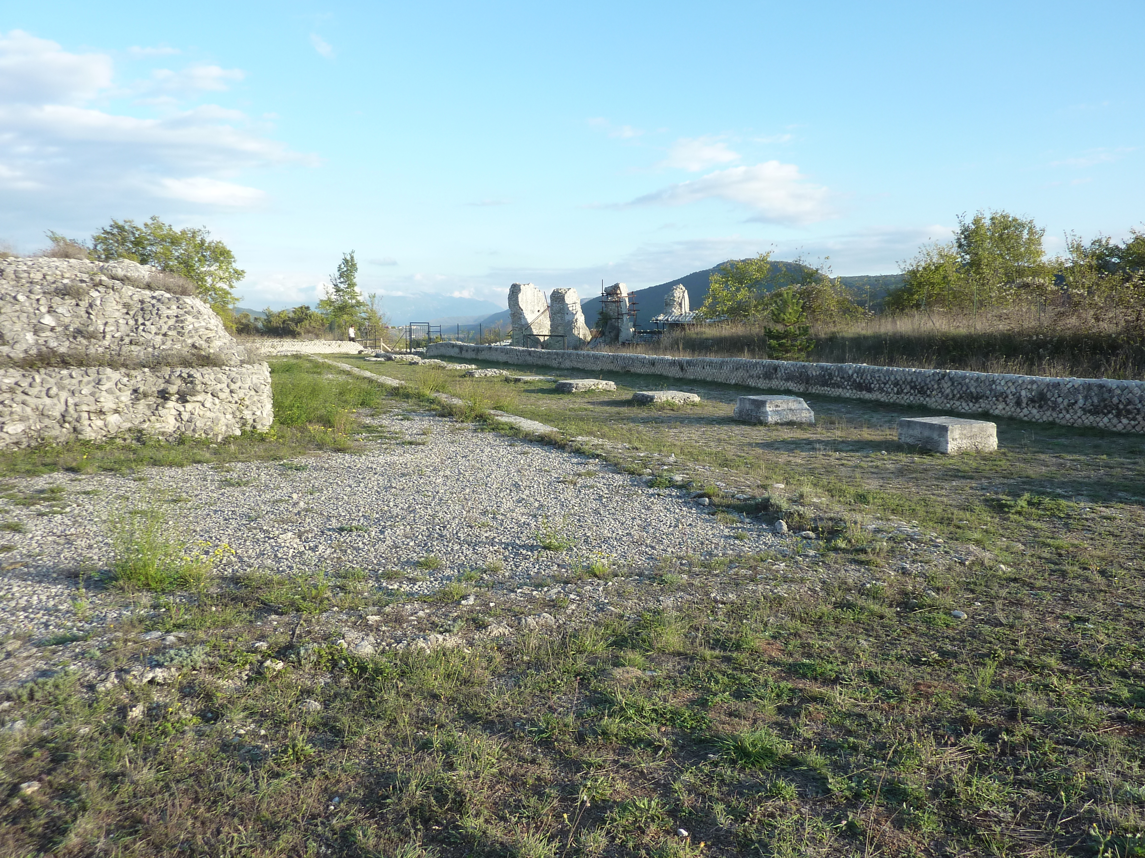 Peltuinum